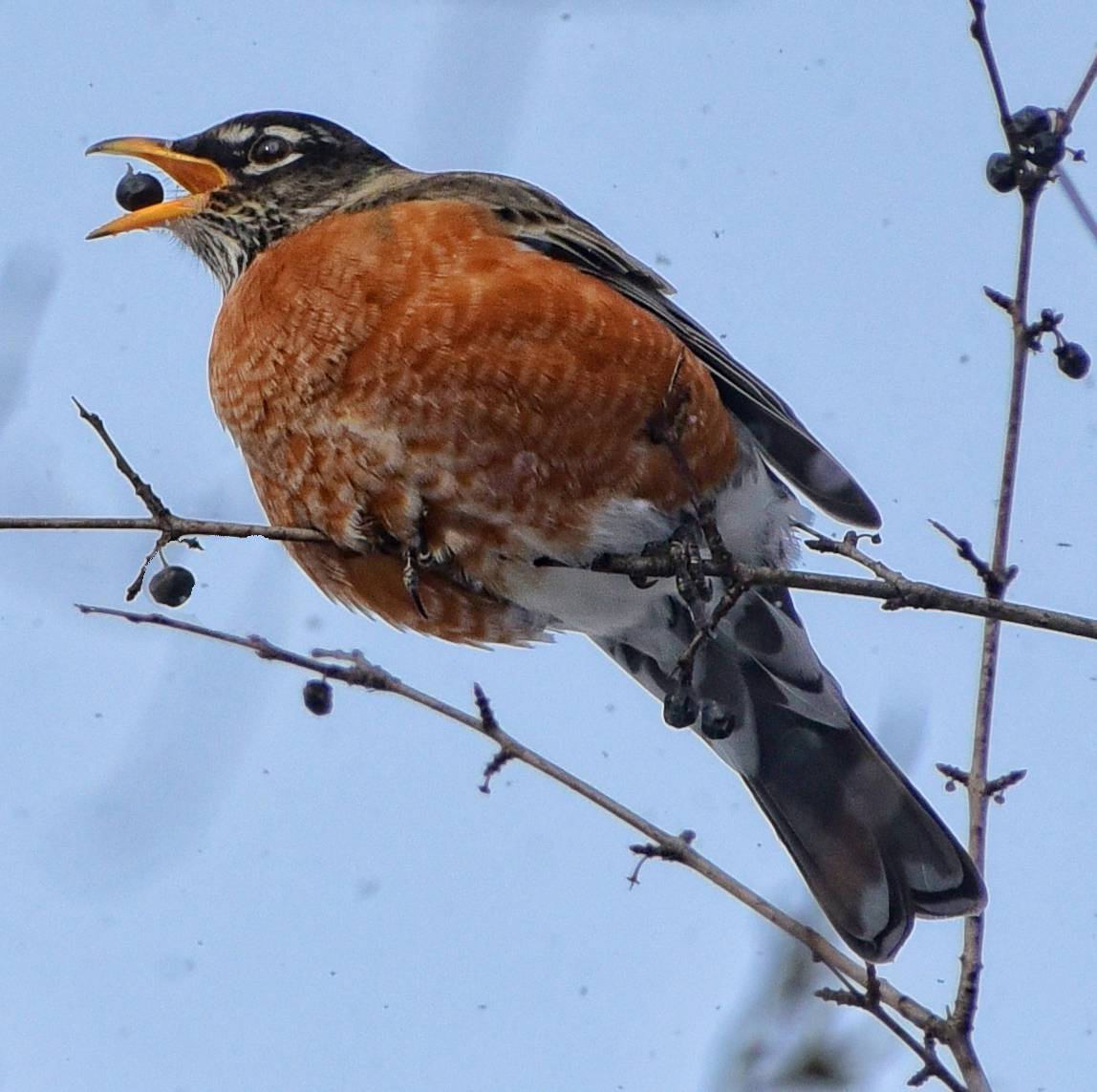 Дрізд мандрівний (Turdus migratorius) (чол.) їсть ягоди взимку в парку Ламбтон Вудс у Торонто